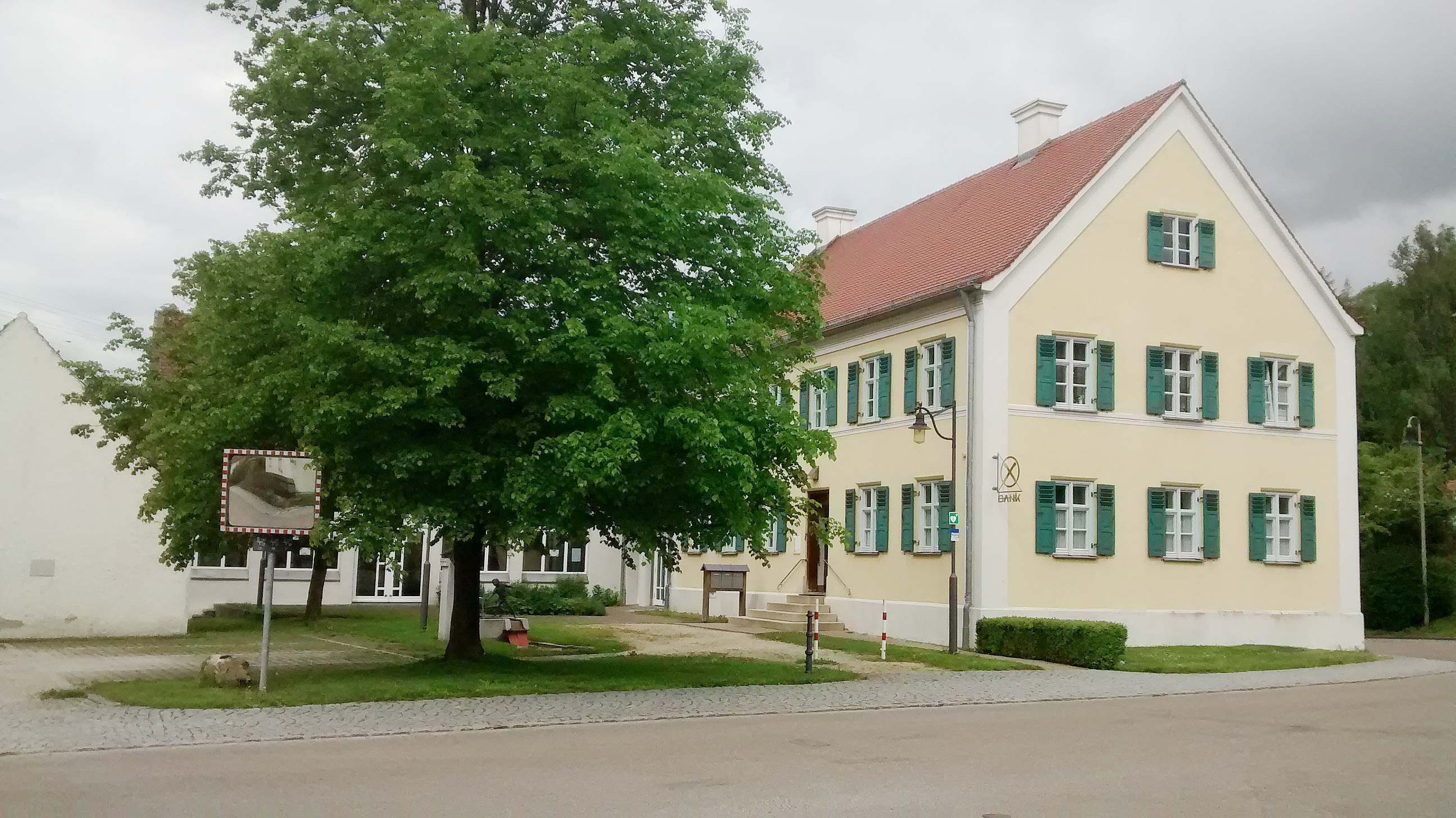 Das Dorfzentrum Mindelaltheim von Osten her betrachtet